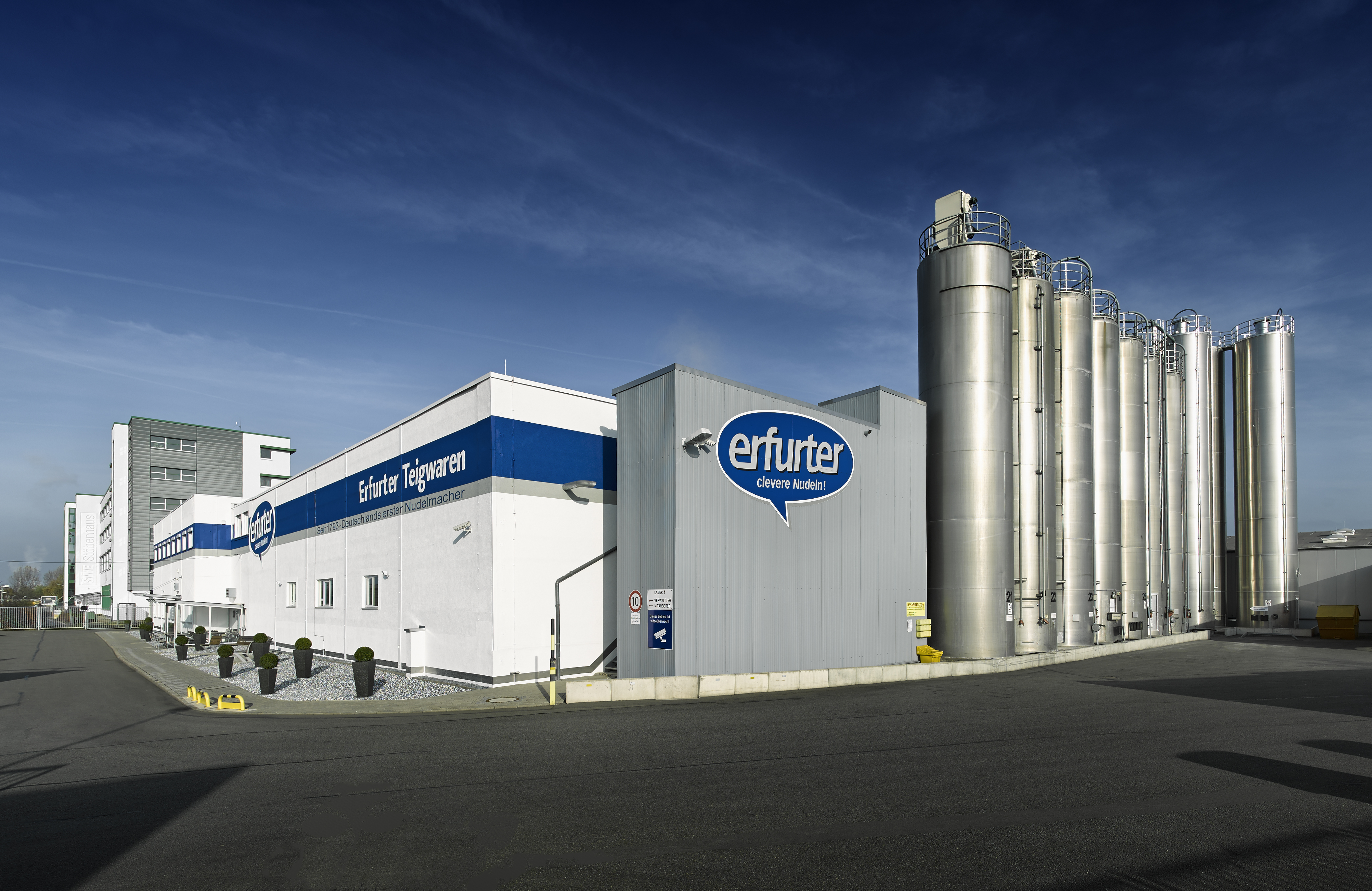 Produktionsstandort und Firmensitz der -Erfurter Teigwaren GmbH- - Eugen-Richter-Straße 27, Erfurt, Thüringen, Deutschland